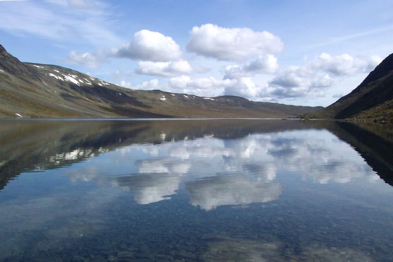 Bessvatnet er en innsjø som ligger i Vågå kommune i OpplandBessvatnet